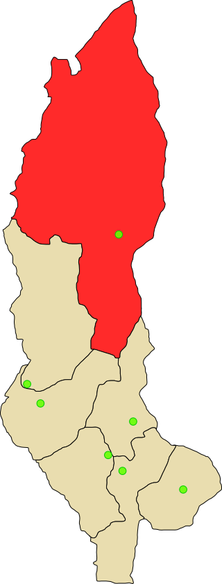 Provincia de Condorcanqui en departamento Amazonas